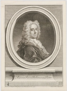 Giovanni Antonio Faldoni Marco Ricci 1724 nach Rosalba Carriera Legende auf dem Stich: Marcus Ricci Bellunensis, Pictor. Desumpt. ab Originali à Rosalb. Car. depict Extat domo D. Ios. Smith. AFaldoni Ven. Sculp. 1724.